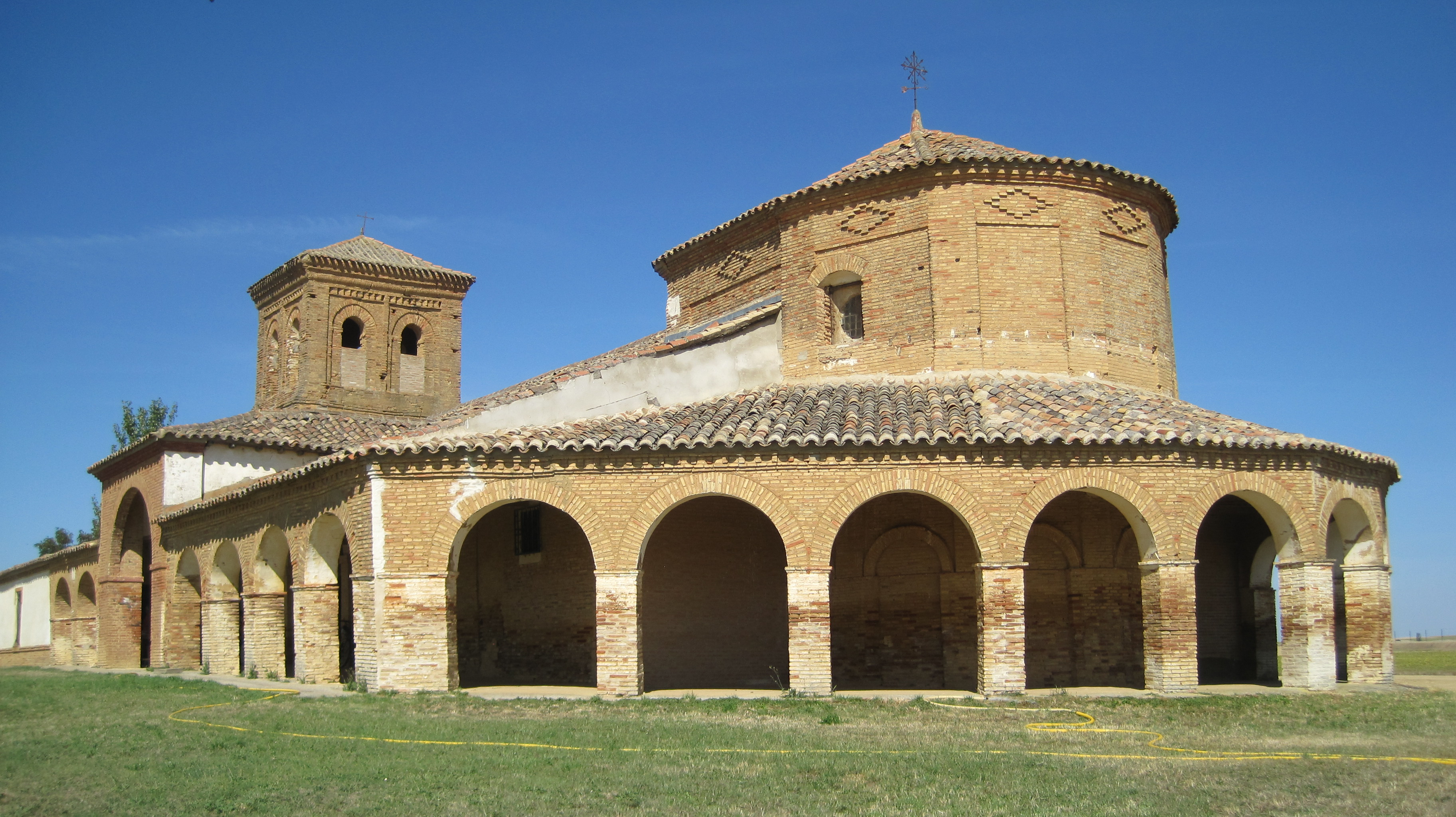 Ermita del Cristo del Amparo, en Cisneros (Palencia, España).